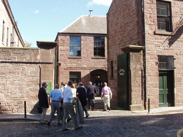 Verdant Jute Works Museum, Dundee